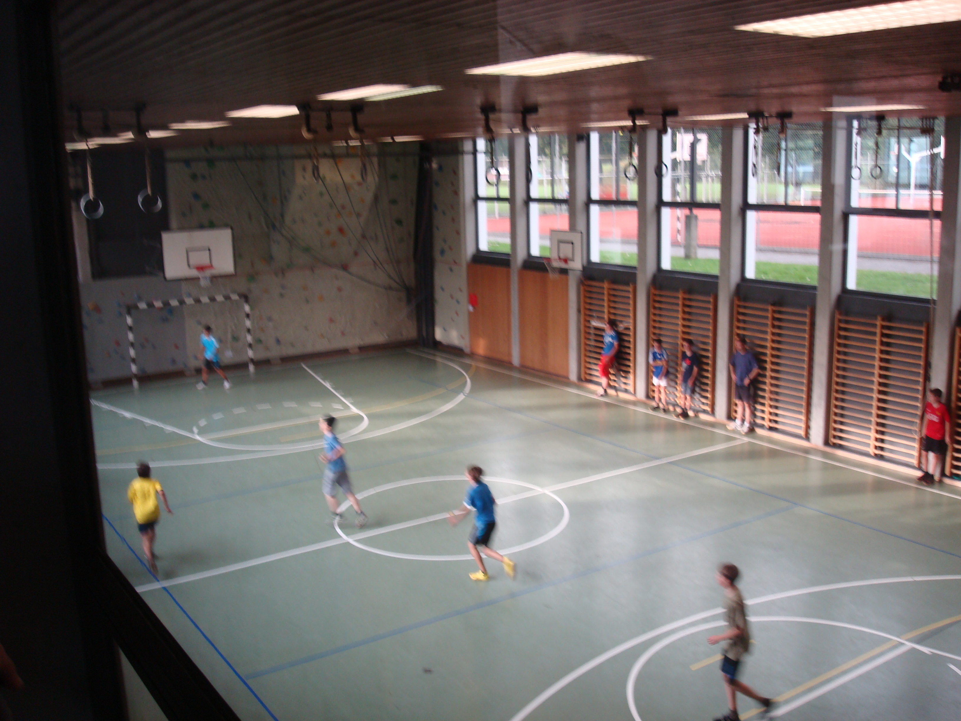 Kantonsschule Sursee: Blick in die untere Turnhalle